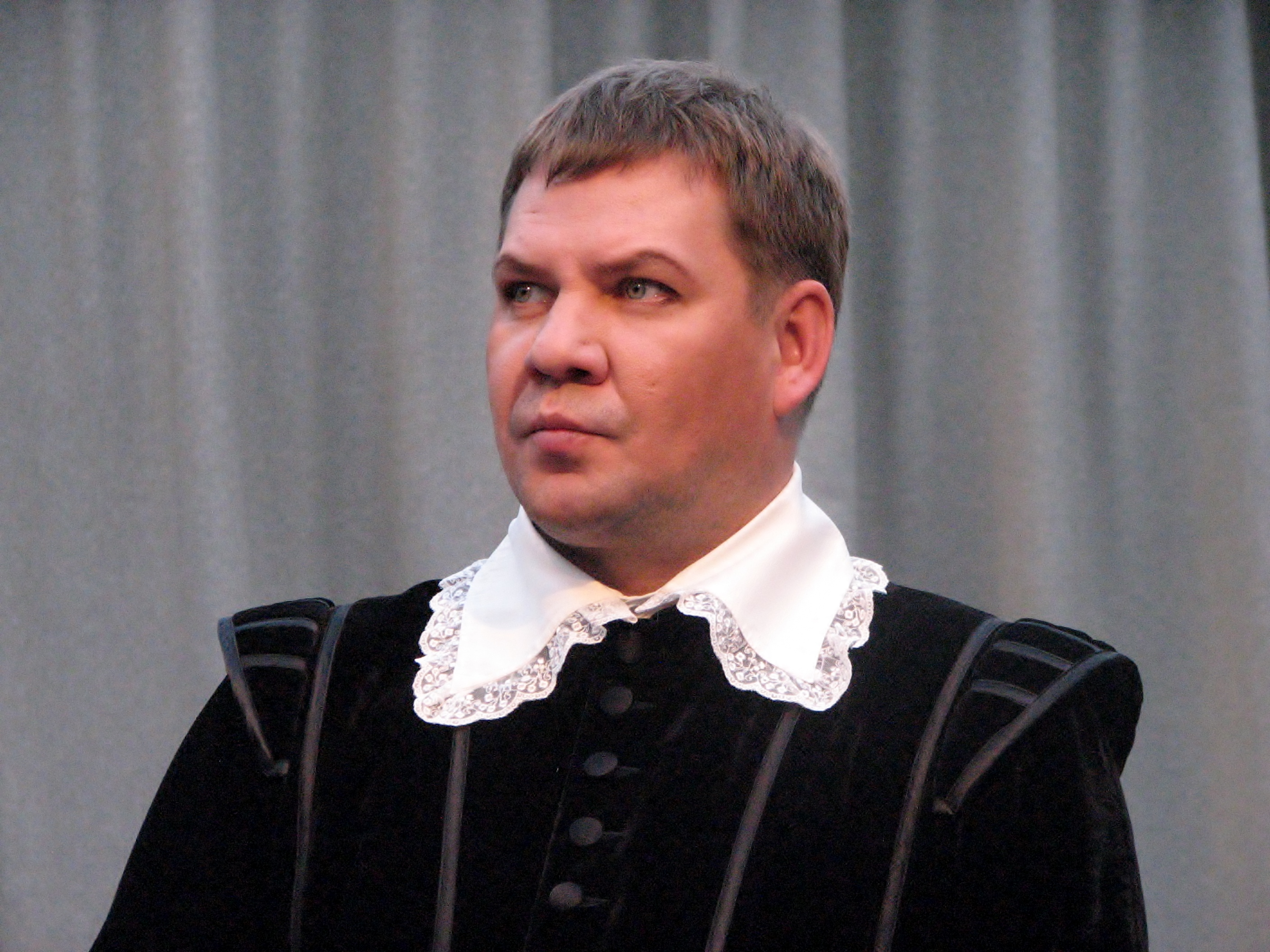 Rauno Elp Estonia maja juubelipidustuste raames autogrammitunnis